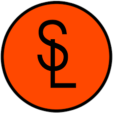 Ancien logo du stade Lavallois dans les années 20